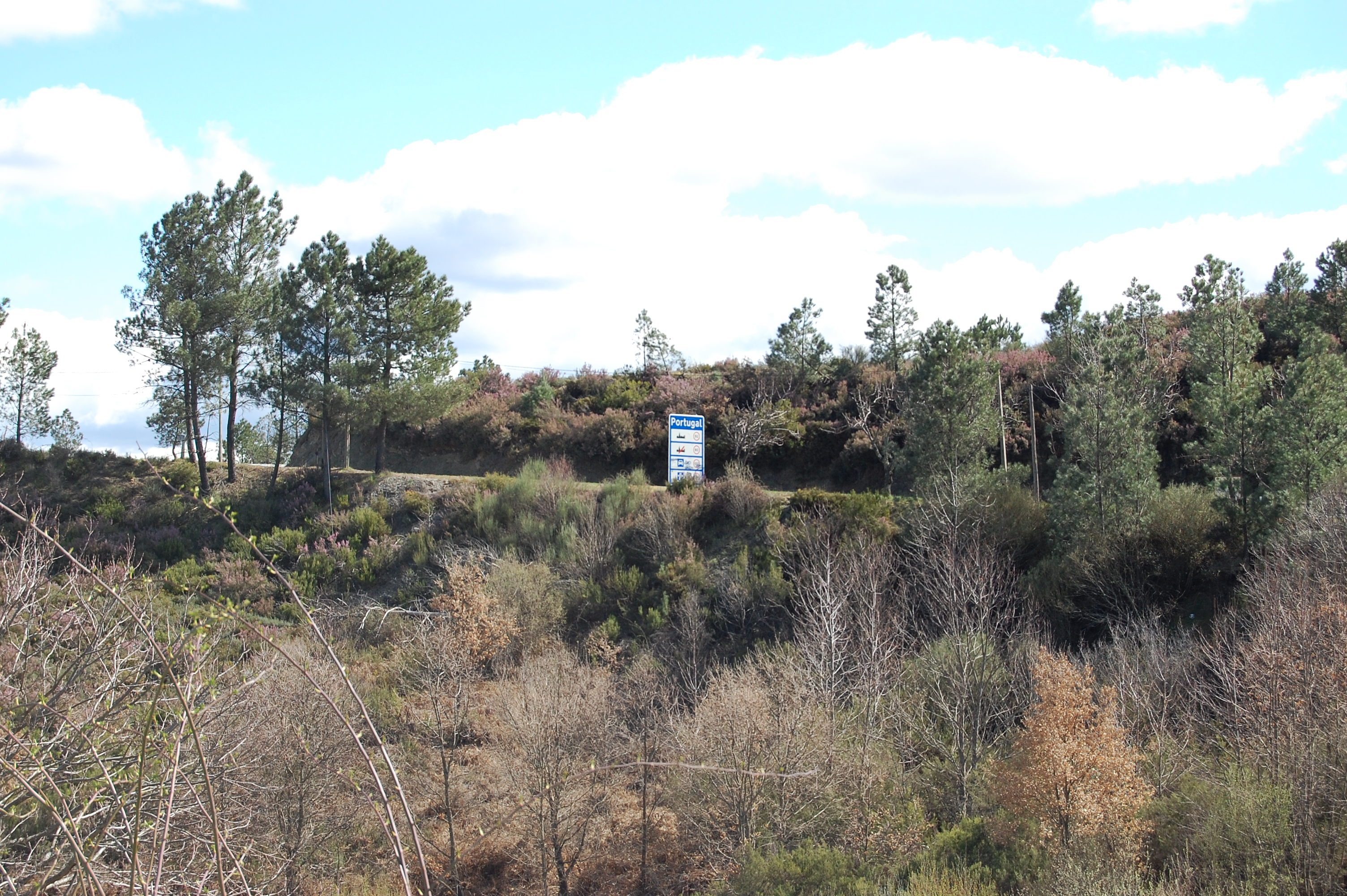 Fronteira entre Portugal (aldeia de França, Bragança) e Espanha (Puebla de Sanabria (Póvoa de Seabra), província de Zamora, Espanha).